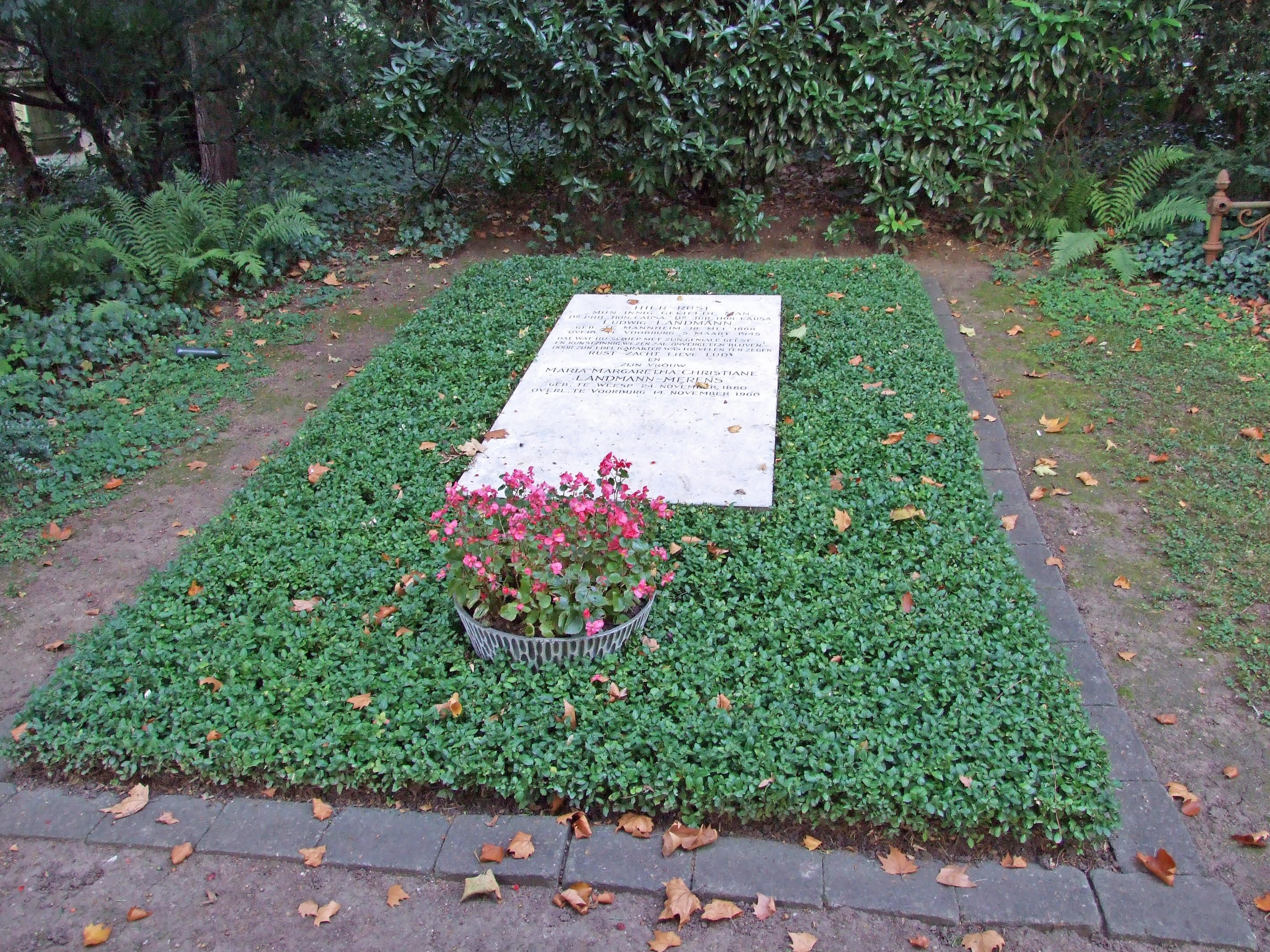 Landmann Grabstelle auf dem Hauptfriedhof in Ffm